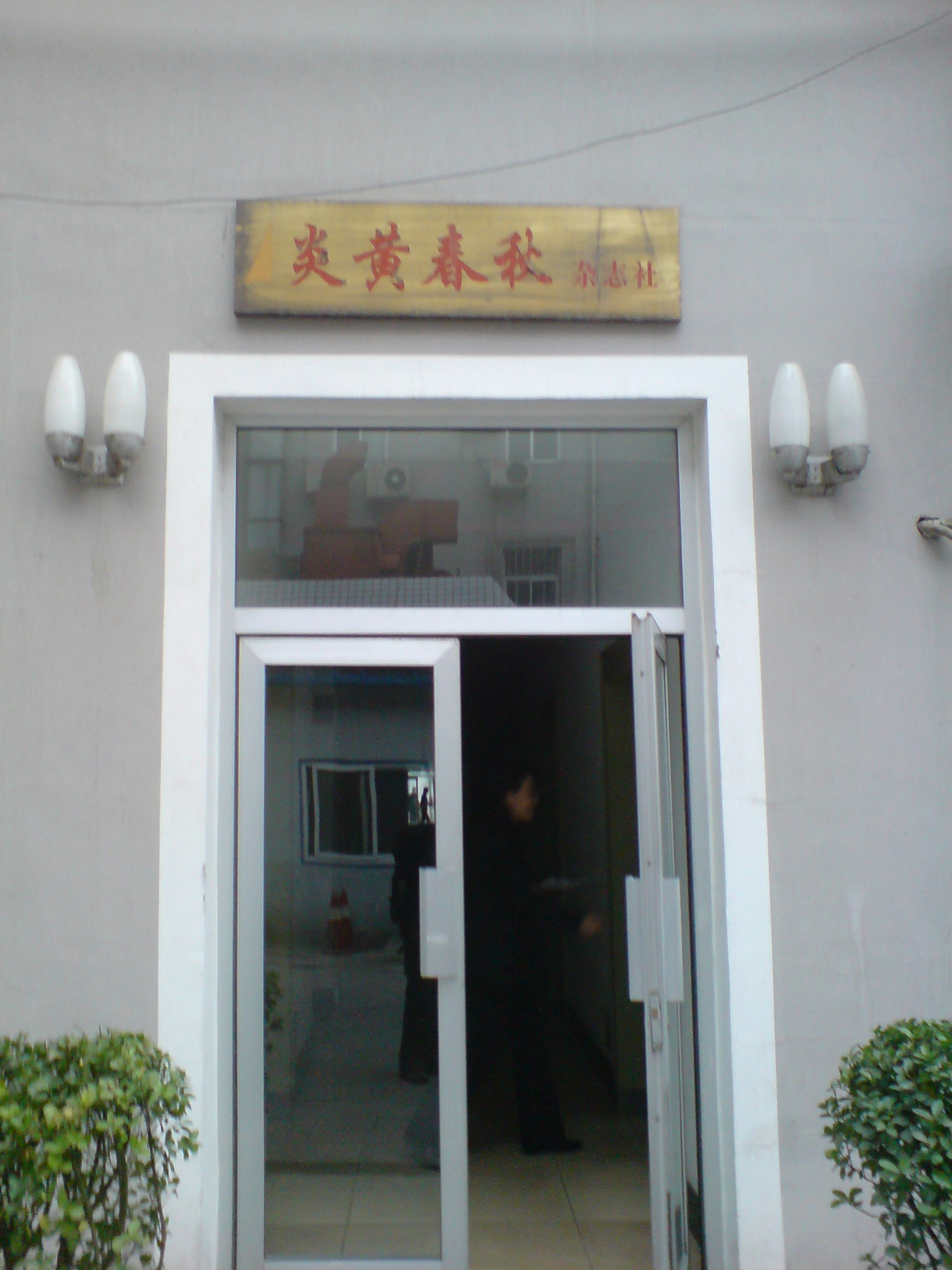 炎黄春秋杂志社入口